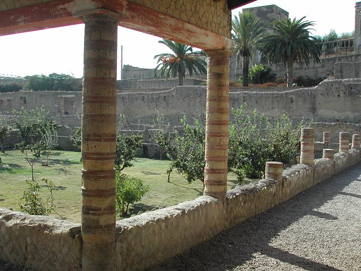 Casa dell'albergo foto di Aldo Ardetti (14 agosto 2007)